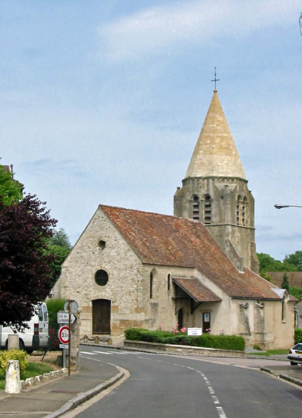 Eglise de Tessancourt-sur-Aubette (Yvelines)01 Photo JH MOra, juin 2005 Catégorie:Image de Tessancourt-sur-Aubette Tessancourt-sur-Aubette